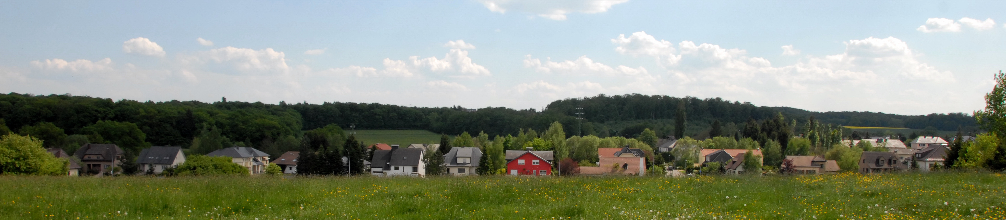 Schléiwenhaff (Gemeng Leideleng). Schleiwenhaff Kategorie:Gemeng Leideleng